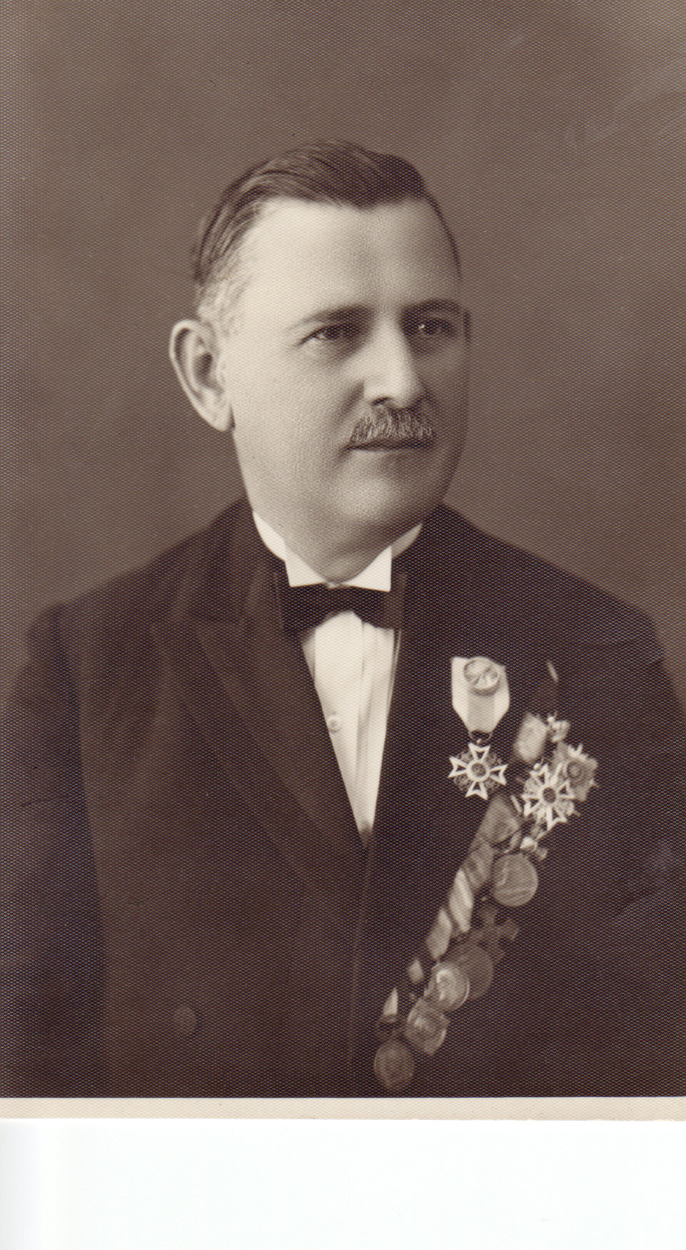 Stefan Stoica Nicolaescu